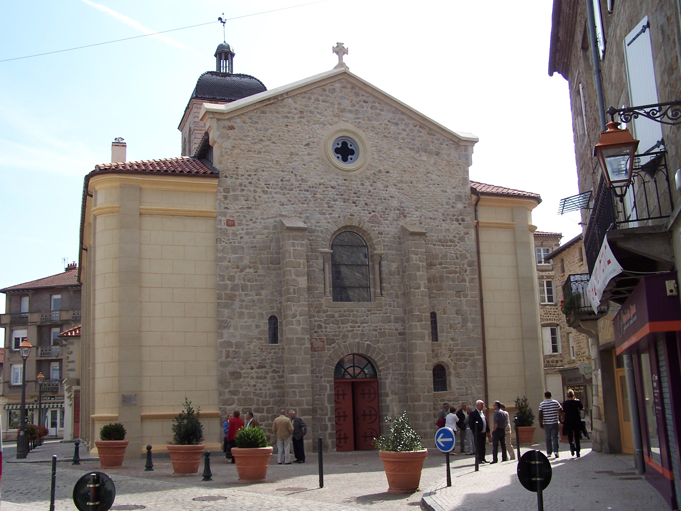 Église Église Saint-Marcellin de Monistrol-sur-Loire, inscrite au titre des monuments historiques en 1932. ref. Mérimée PA00092717